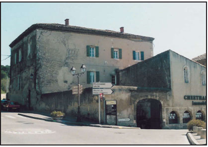 Maison partielle des chanoines des Trinitaires (1512)